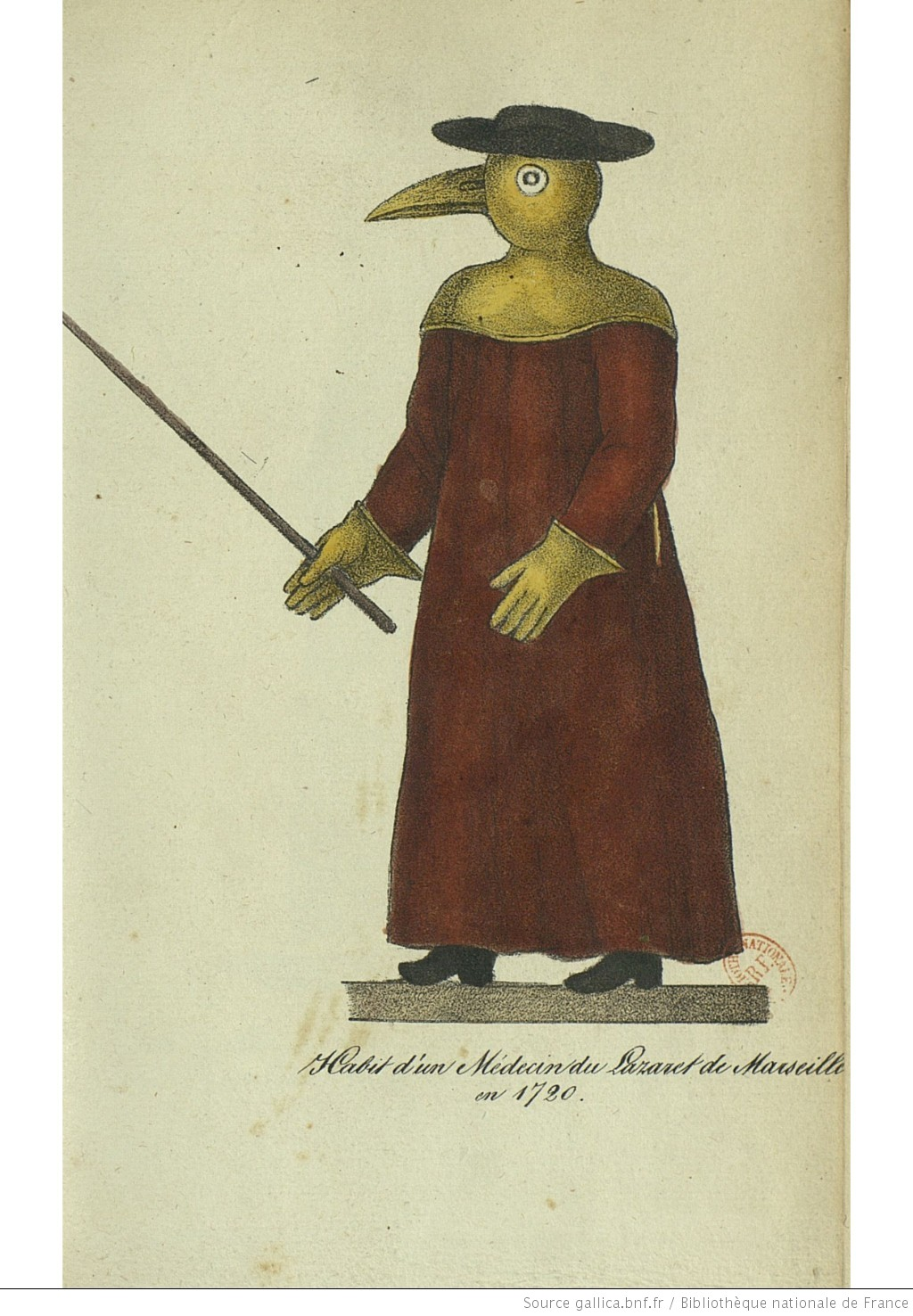 Illustration d'un médecin en costume au lazaret de Marseille pendant l'épidémie de peste de 1720. Dessin paru en 1826 dans le Guide sanitaire des gouvernemens européens, ou Nouvelles recherches sur la fièvre jaune et le choléra-morbus de Louis-Joseph-Marie Robert (1771-1850), auteur du texte.